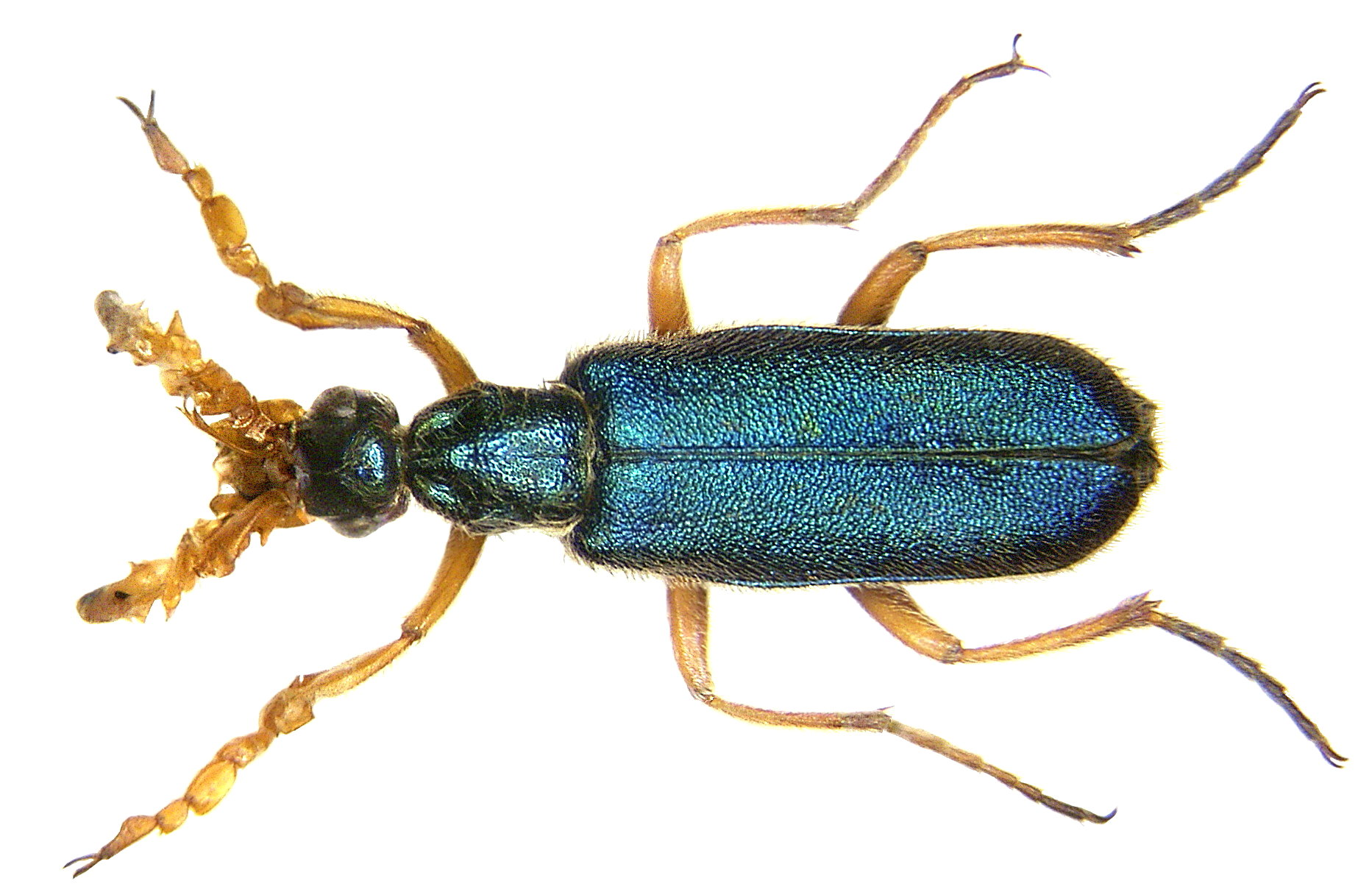 Cerocoma schreberi (Fabricius, 1881) male Familie: Meloidae Groesse: 9-18 mm Verbreitung: Südeuropa, Osteuropa, Mittelasien, Westasien Fundort: Kasachstan, Taschkarasu leg. Lukthanov, 1993; det. U.Schmidt, 2006 Photo: U.Schmidt, 2006